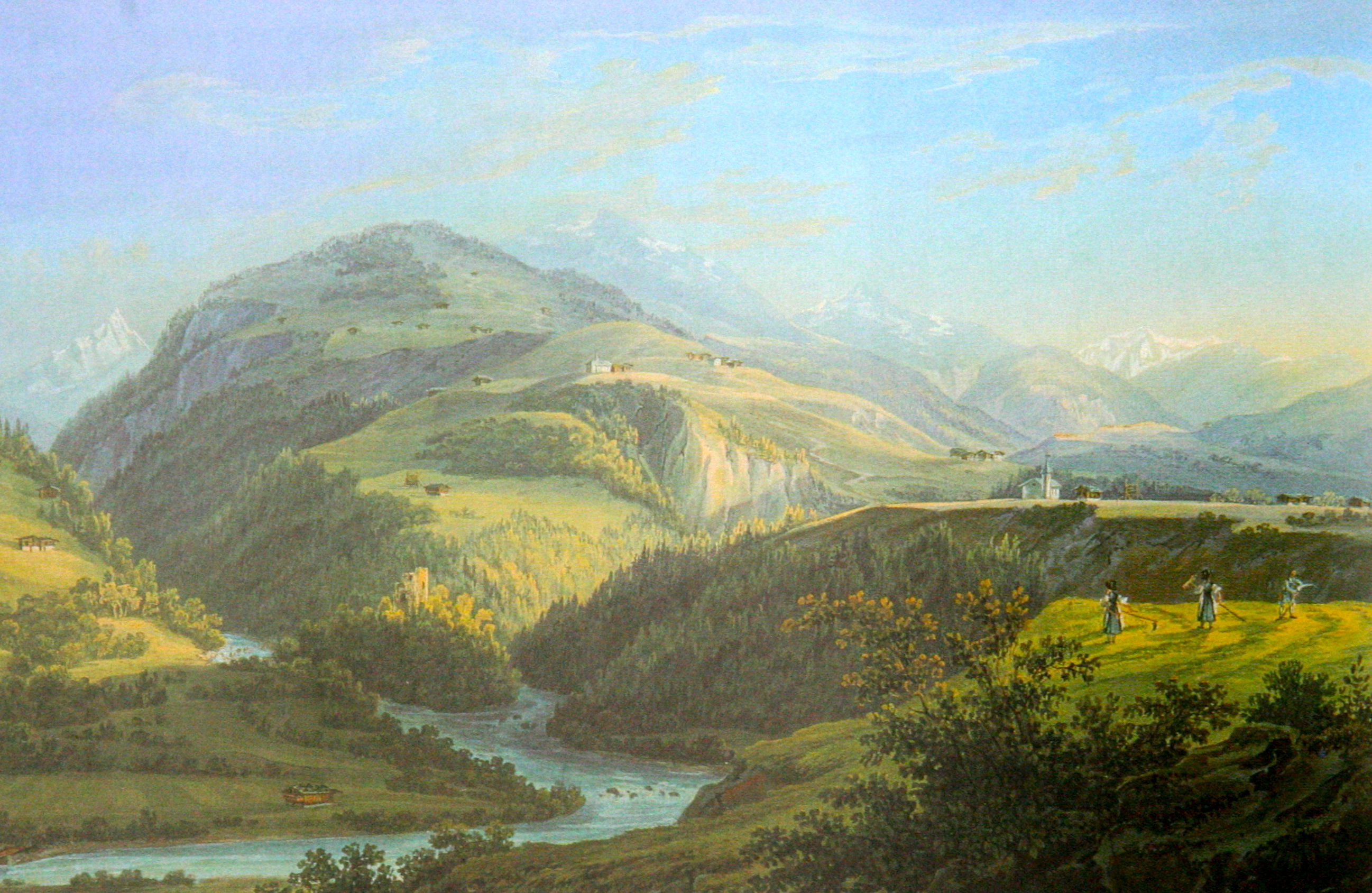 Bei Disentis/Mustér rechts die Kapelle St. Agatha (Disentis), in der Mitte Mompé Medel, um 1818